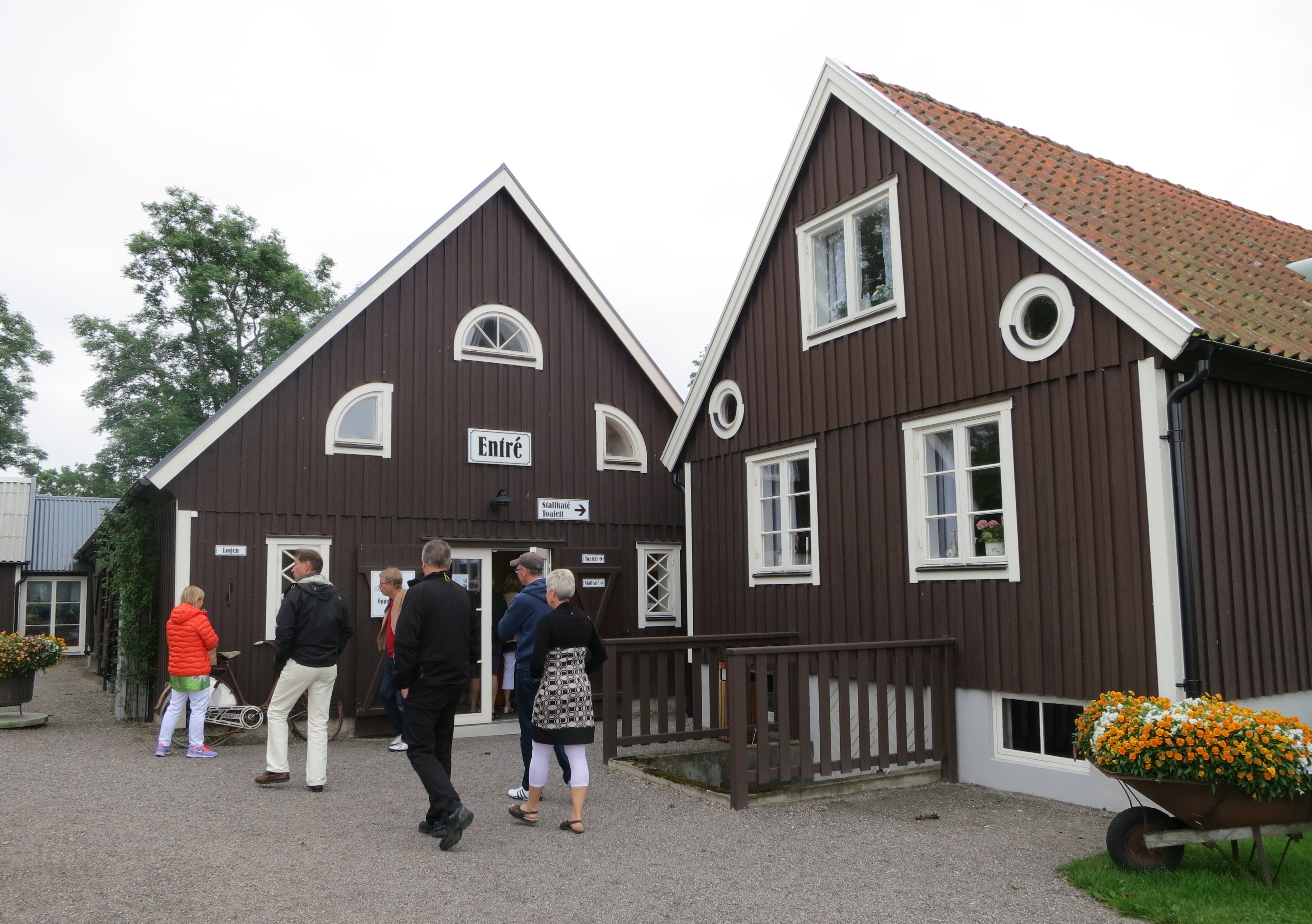 Birgit Nilsson Museum i Västra Karup, Skåne